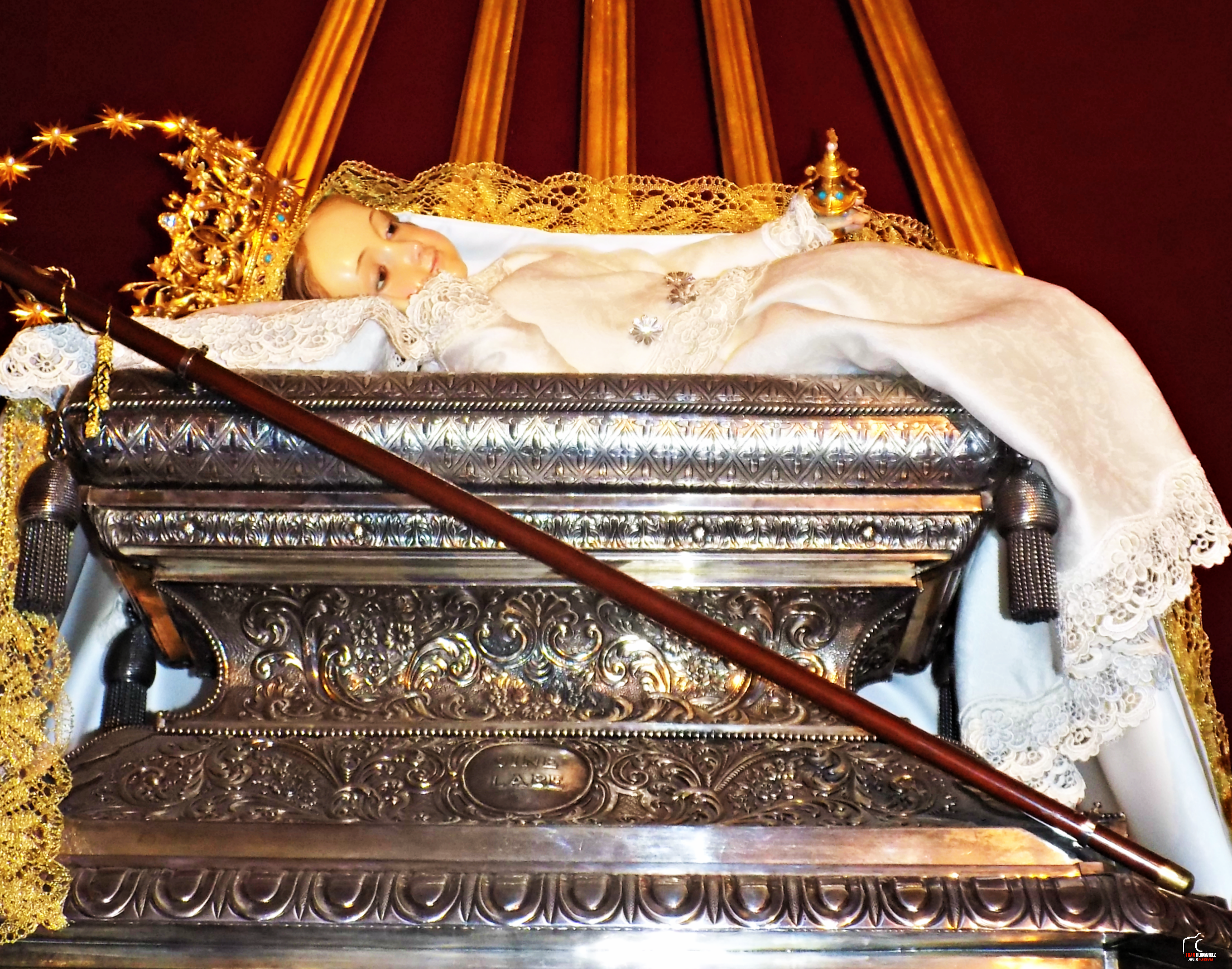 Imagen de la Divina Infantita, Patrona y Alcaldesa Perpetua de la Ciudad de El Ejido en la Provincia de Almería (España).